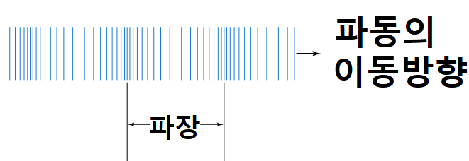 종파를 설명하는 그림